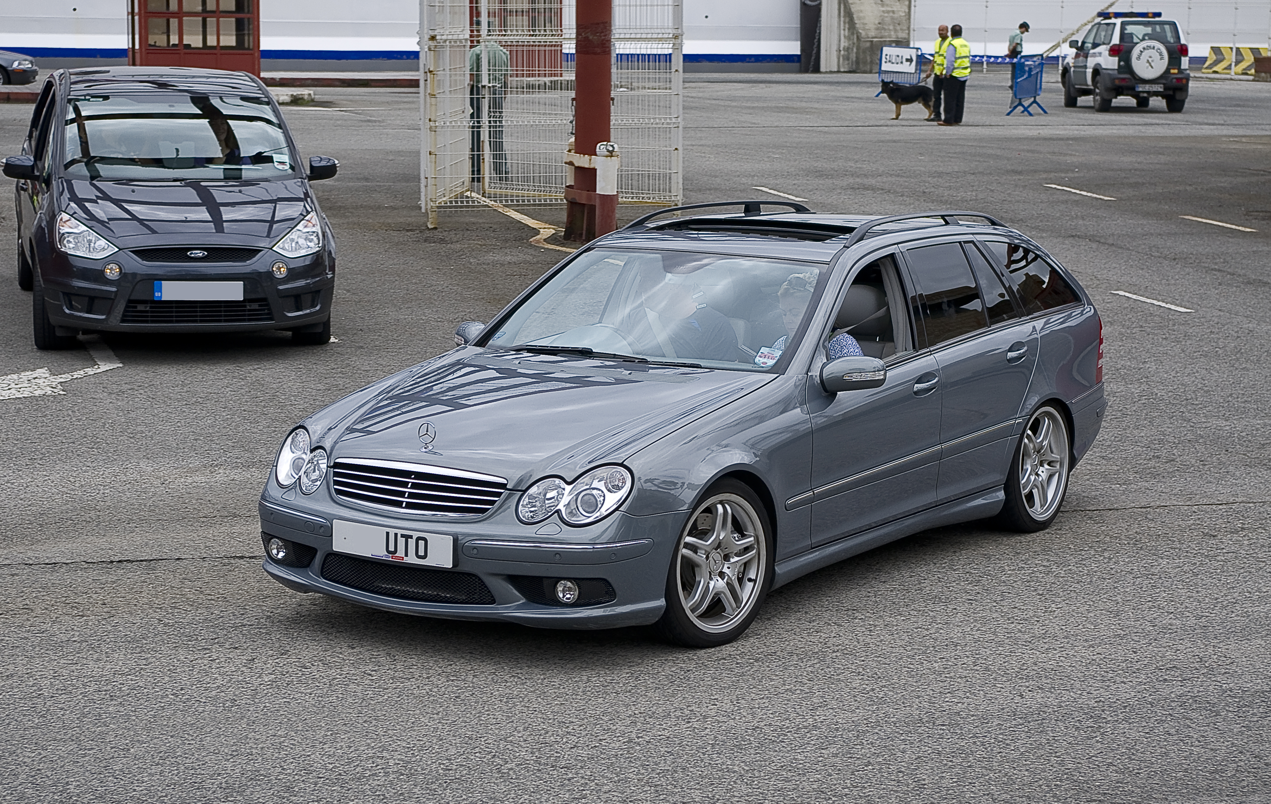 2005 Mercedes-Benz C55 AMG [S203]